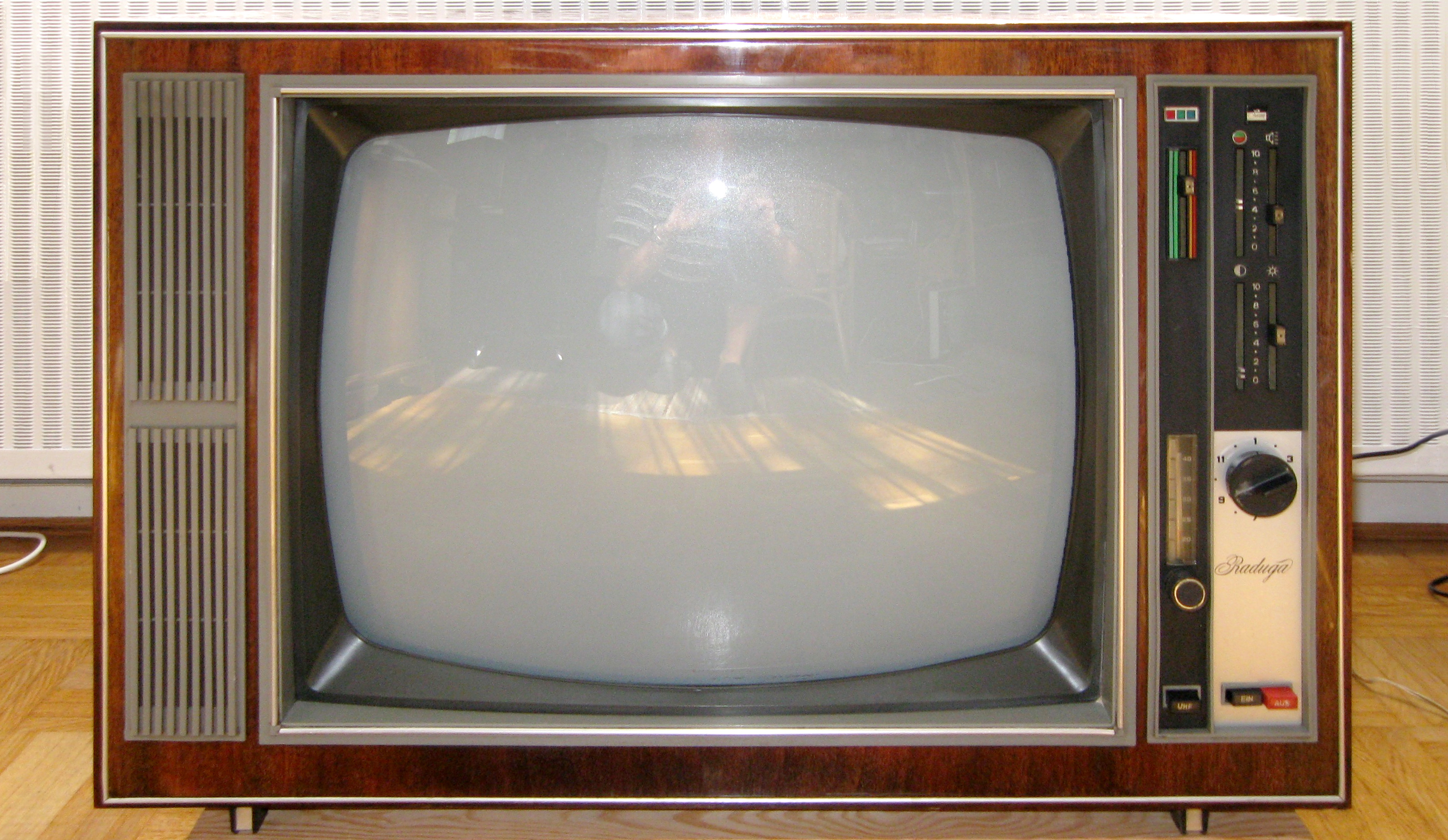 Raduga 706 - Sowjetischer Farbfernseher von 1977